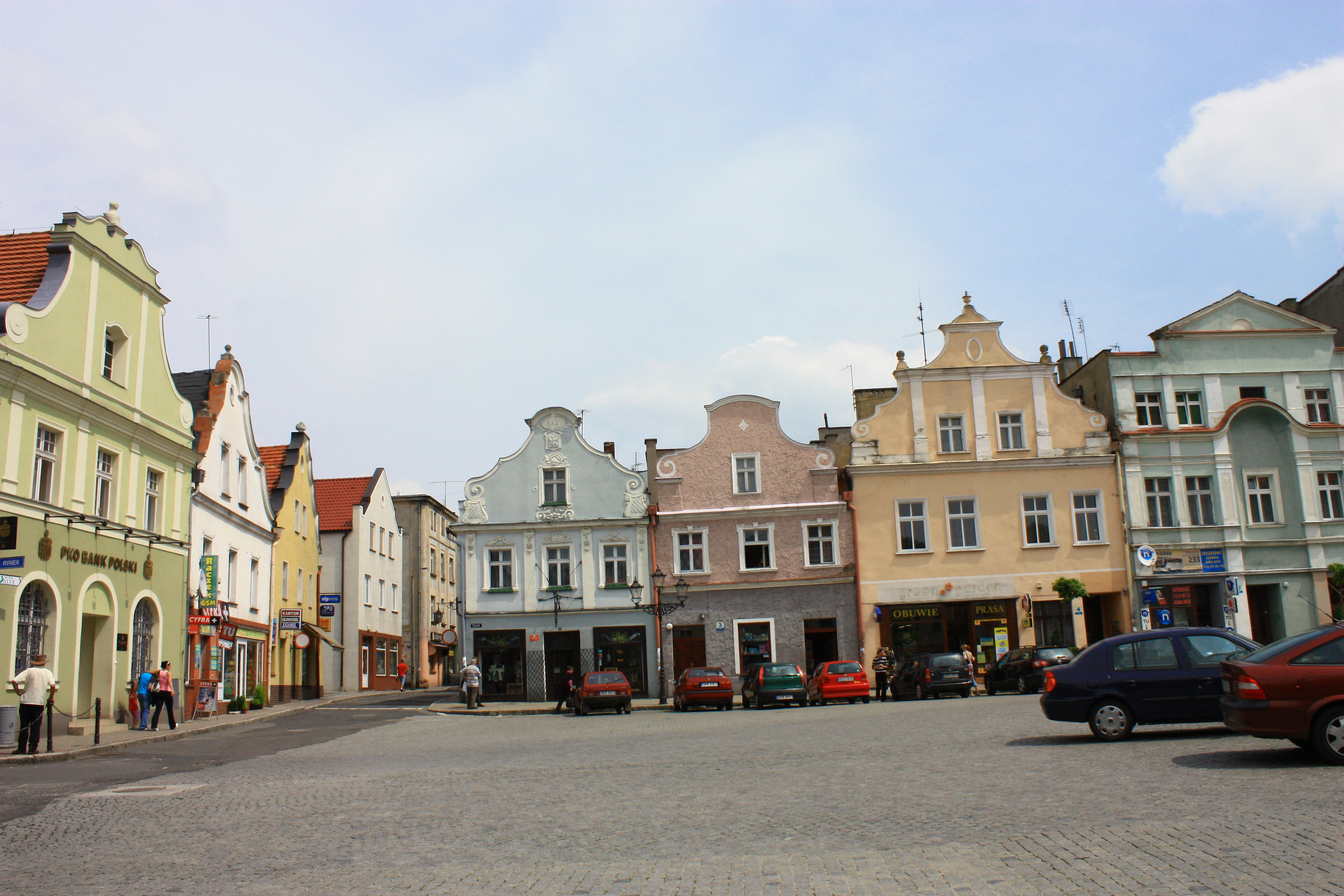 Głogówek, Stare Miasto 184 z 10.06.1949.